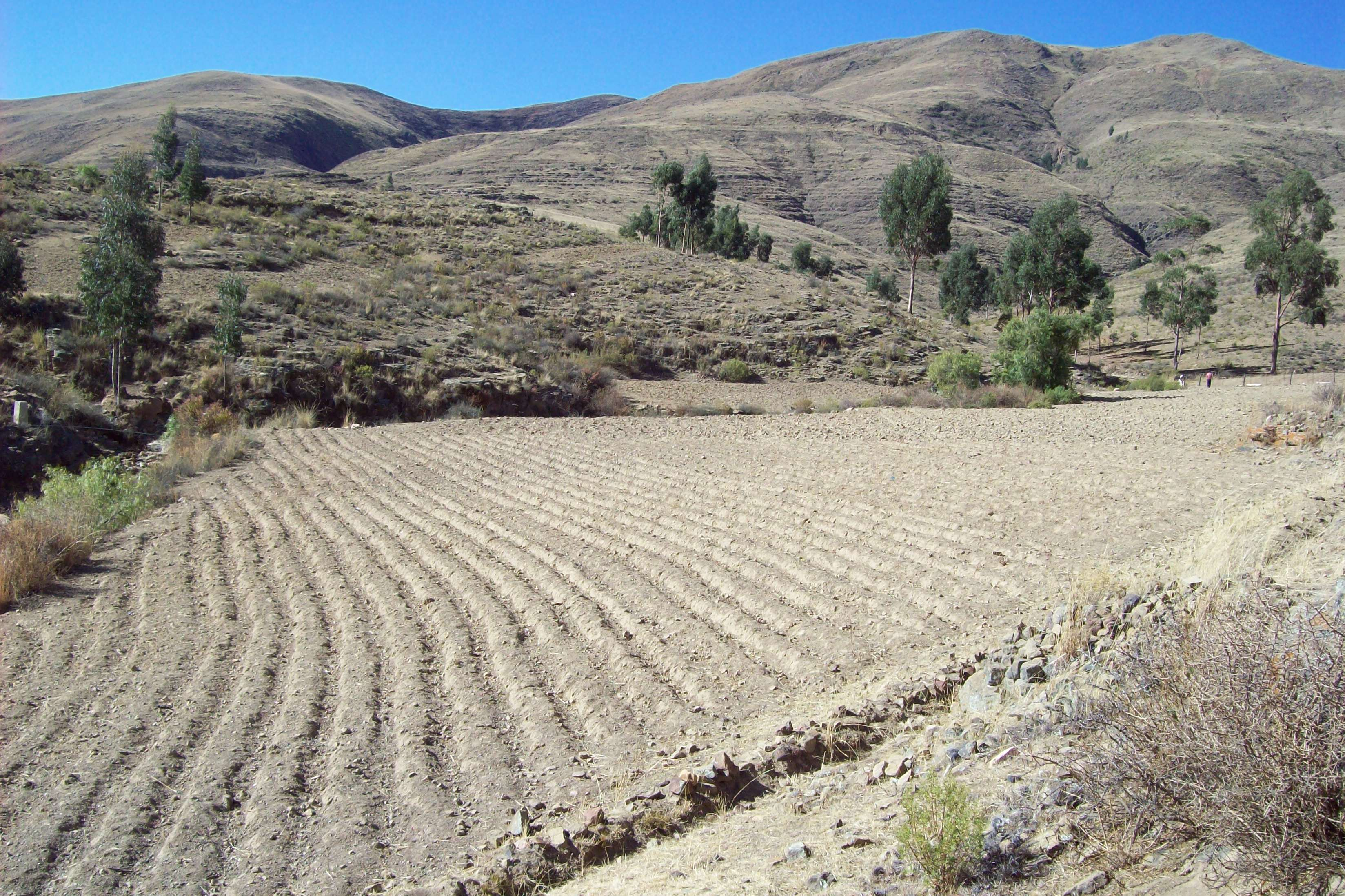 Agriculture in Bolivia.